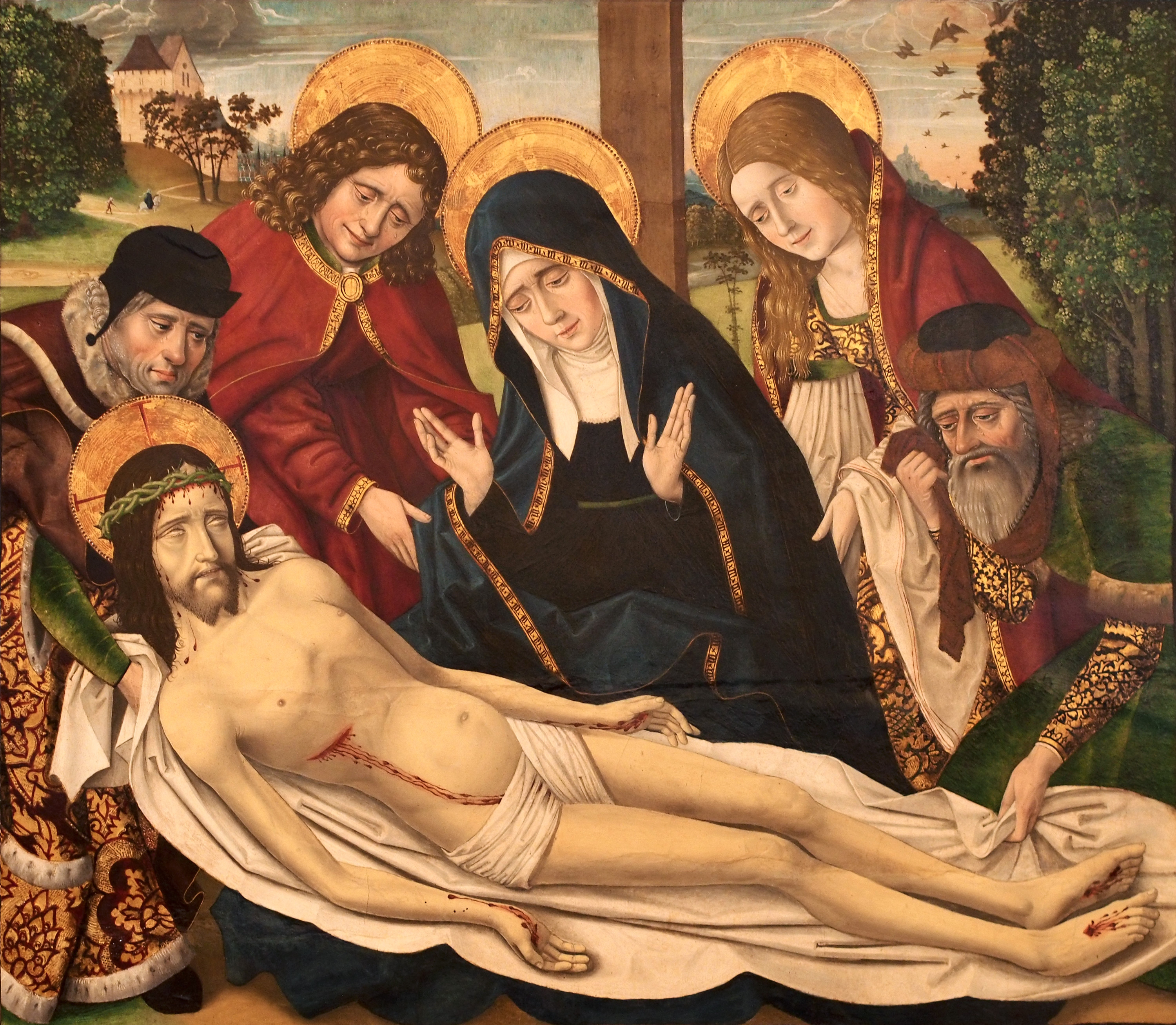 Llanto sobre Cristo muerto, óleo sobre tabla, c. 1500. Autor anónimo, citado modernamente como Maestro de Osma. Museo de Valladolid.